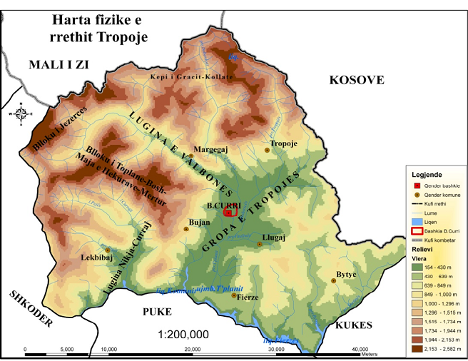 Harta fizike e rrethit Tropoje